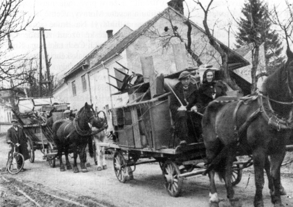 Česky: Obyvatelé Rychtářova u Vyškova opouštějí v březnu 1941 svoji rodnou vesnici, okduk byli násilně vyhnáni z důvodu rozšíření německé vojenské střelnice